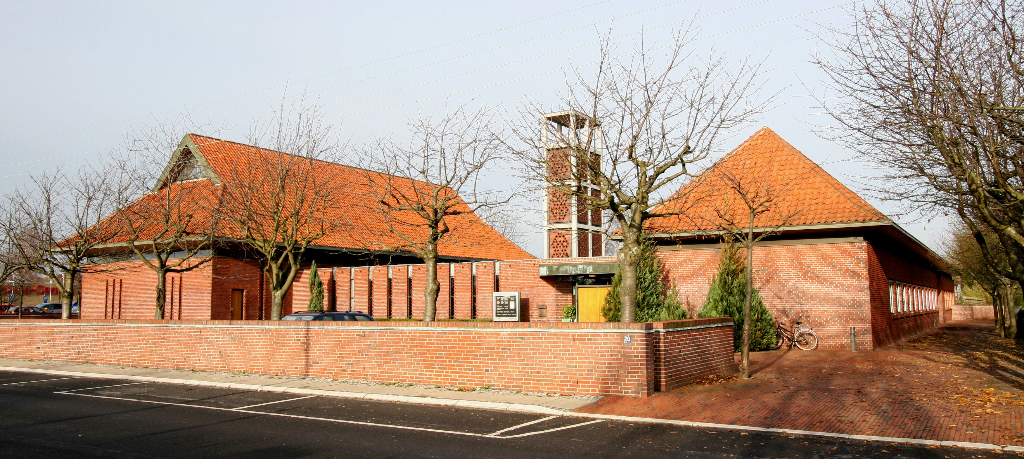 Hundige Kirke, Roskilde County, Denmark Exterior